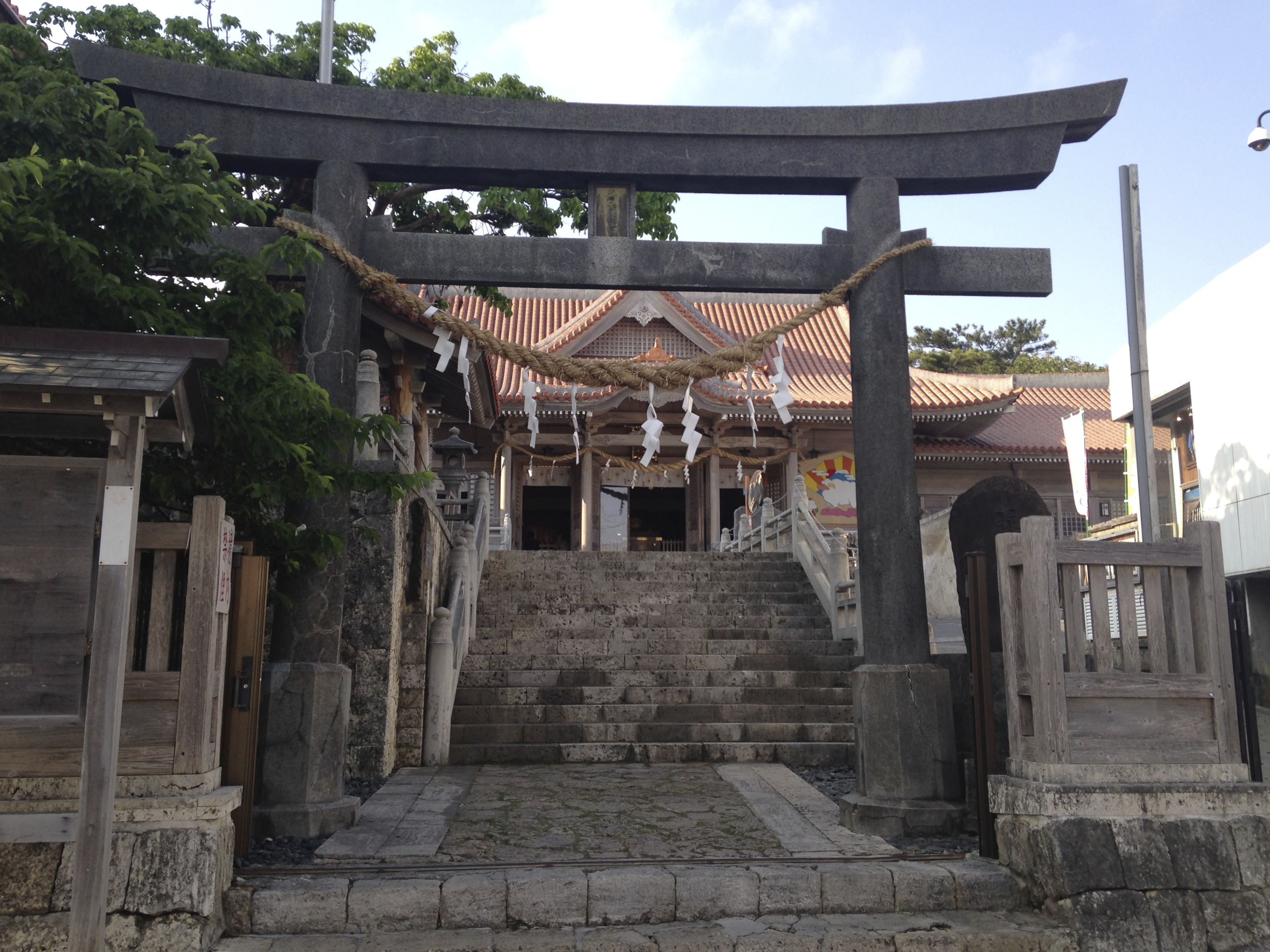 普天満宮の鳥居